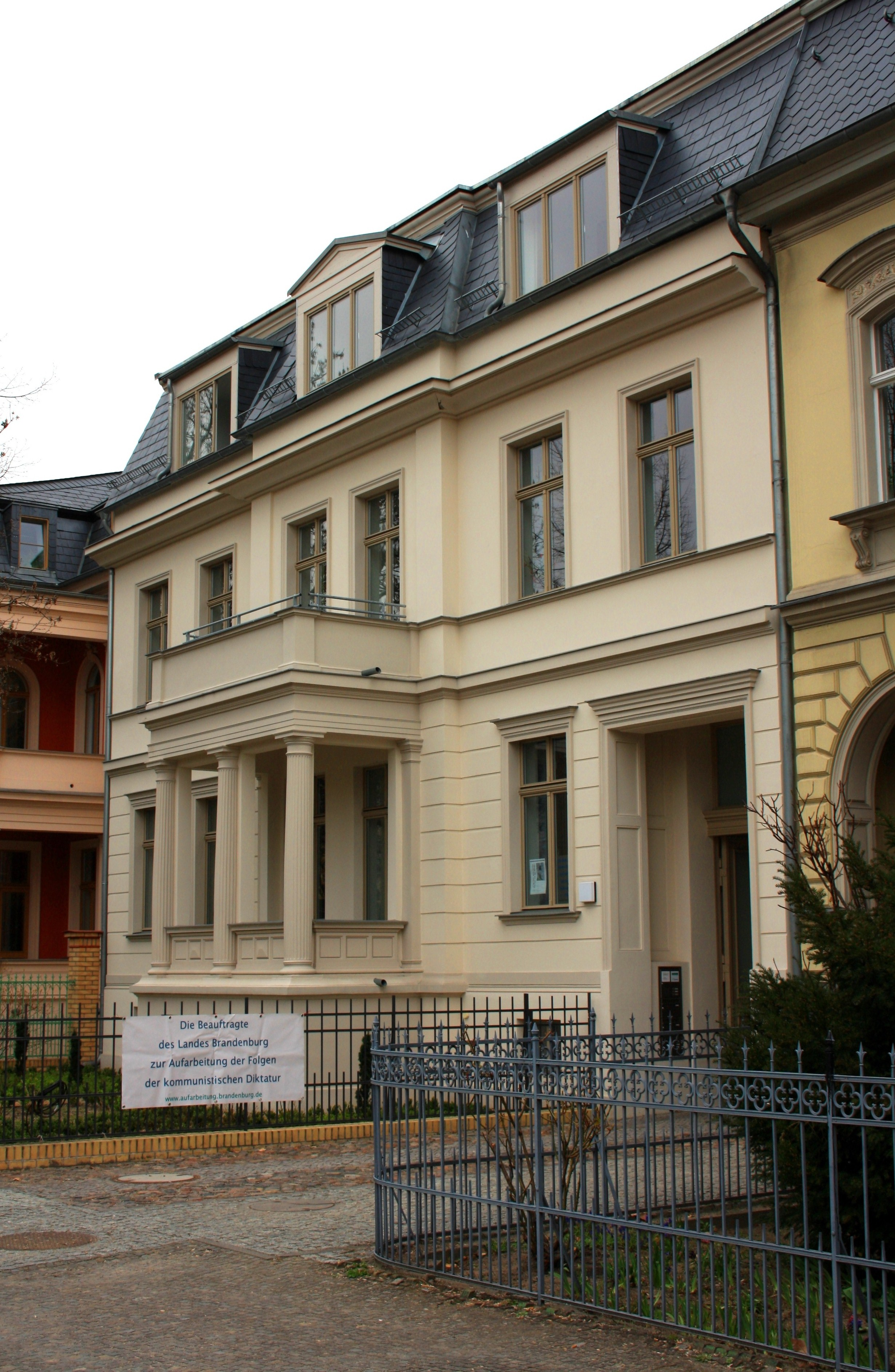 Der Sitz der/s Beauftragten des Landes Brandenburg zur Aufarbeitung der Folgen der kommunistischen Diktatur in der Hegelallee 3, 14467 Potsdam.